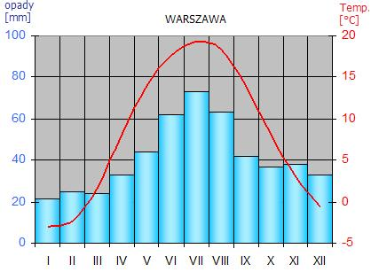 klimatogram WARSZAWY na podstawie danych GUS i IMiGW